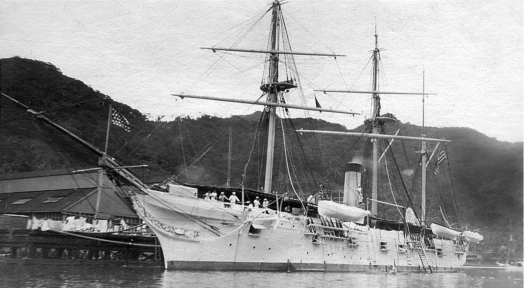 USS Adams (1874)